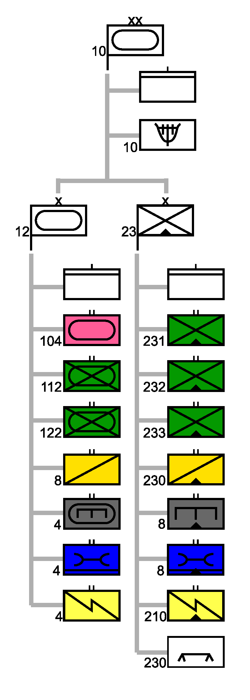 Gliederung 10. Panzerdivision im deutschen Heeres.